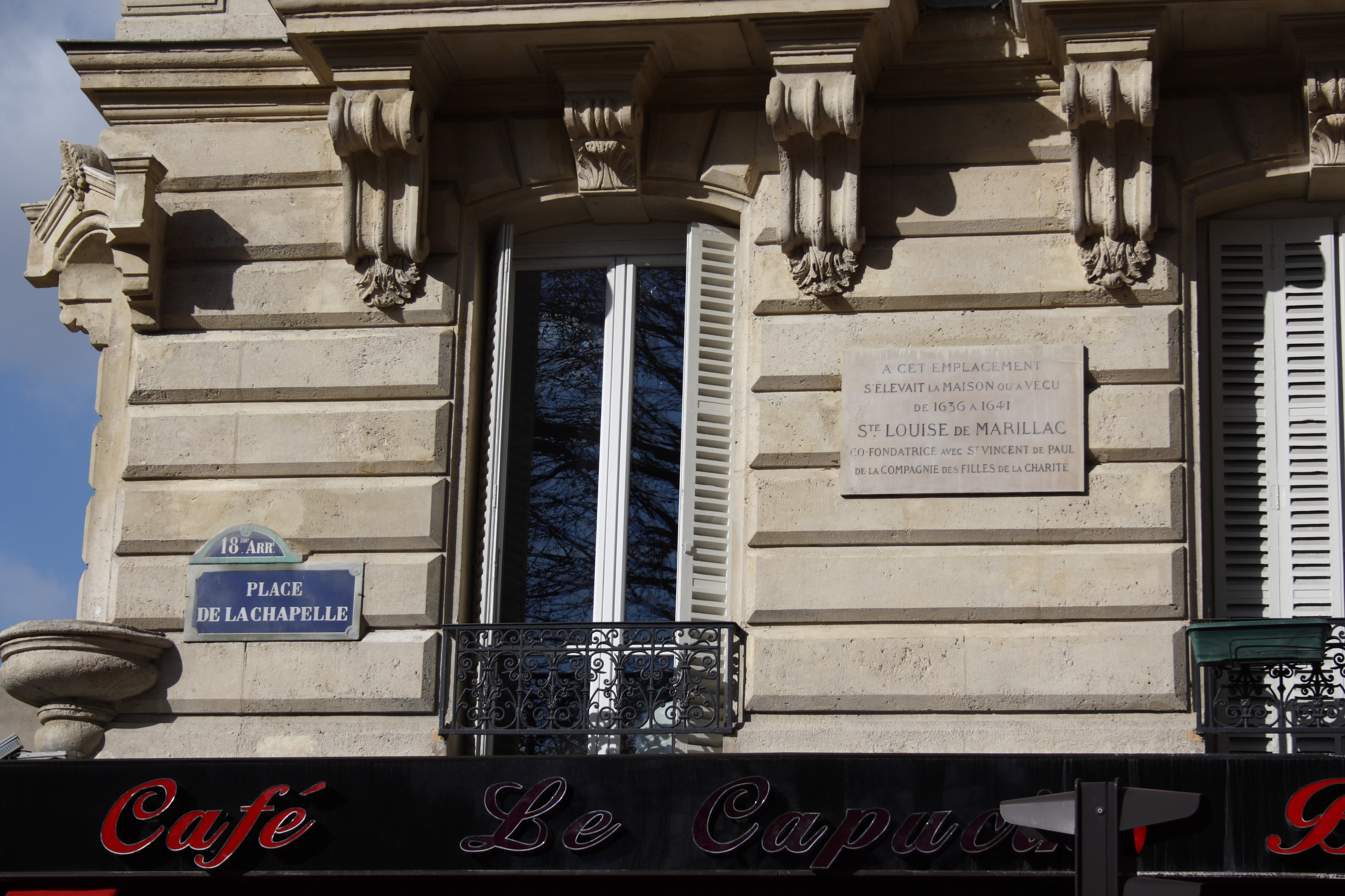 Gedenktafel für Luise von Marillac an einem Gebäude an der Place de la Chapelle im 18. Arrondissement von Paris